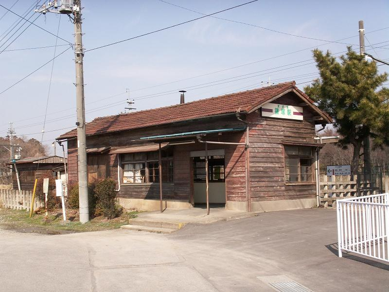 篠塚駅（2006年3月5日、投稿者Jnr bus撮影）